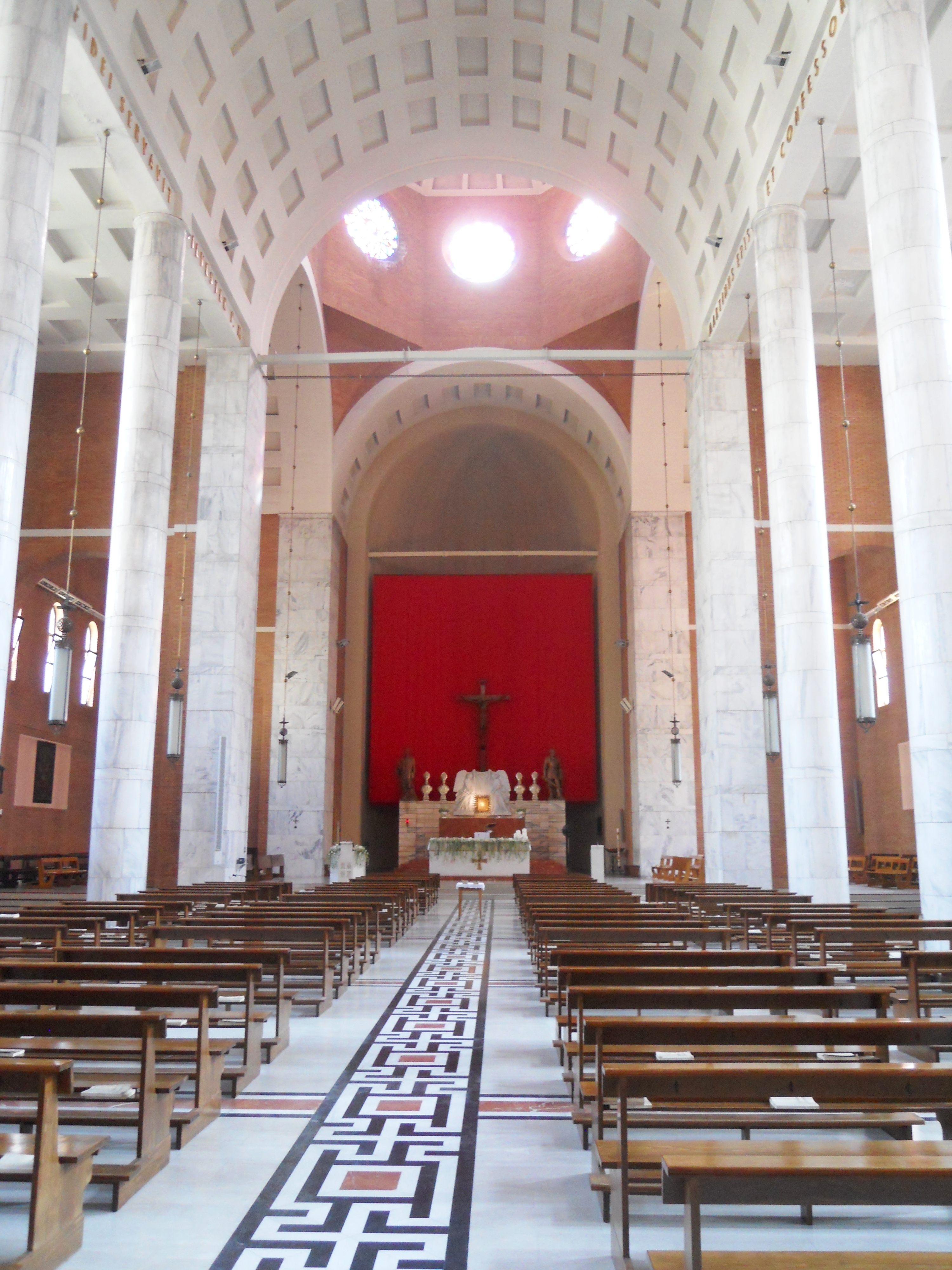 L'interno a croce latina con tre navate, cupola, transetto e abside semicircolare della chiesa dei Santi Silvestro e Martino in Milano.